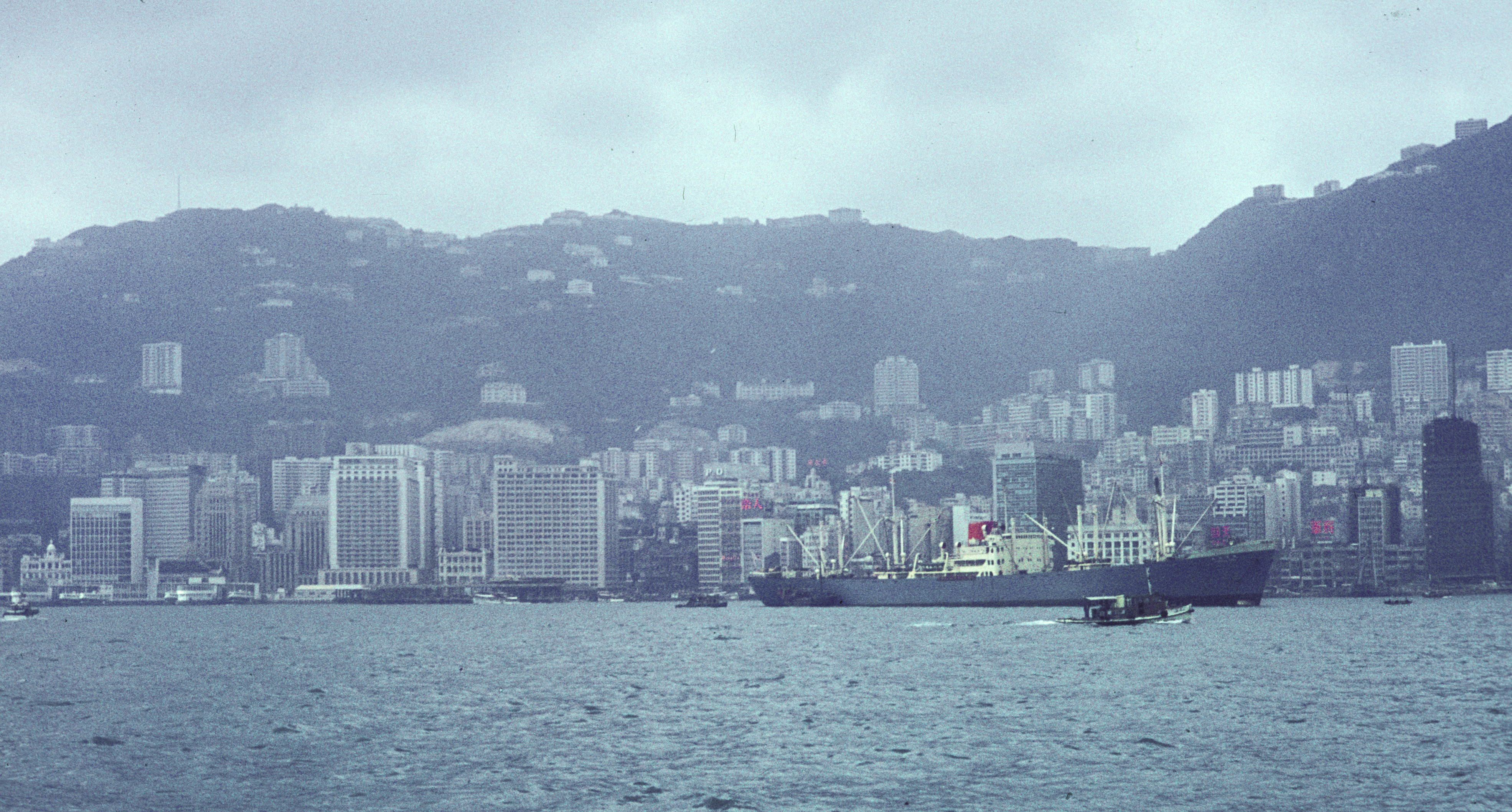 Hong Kong